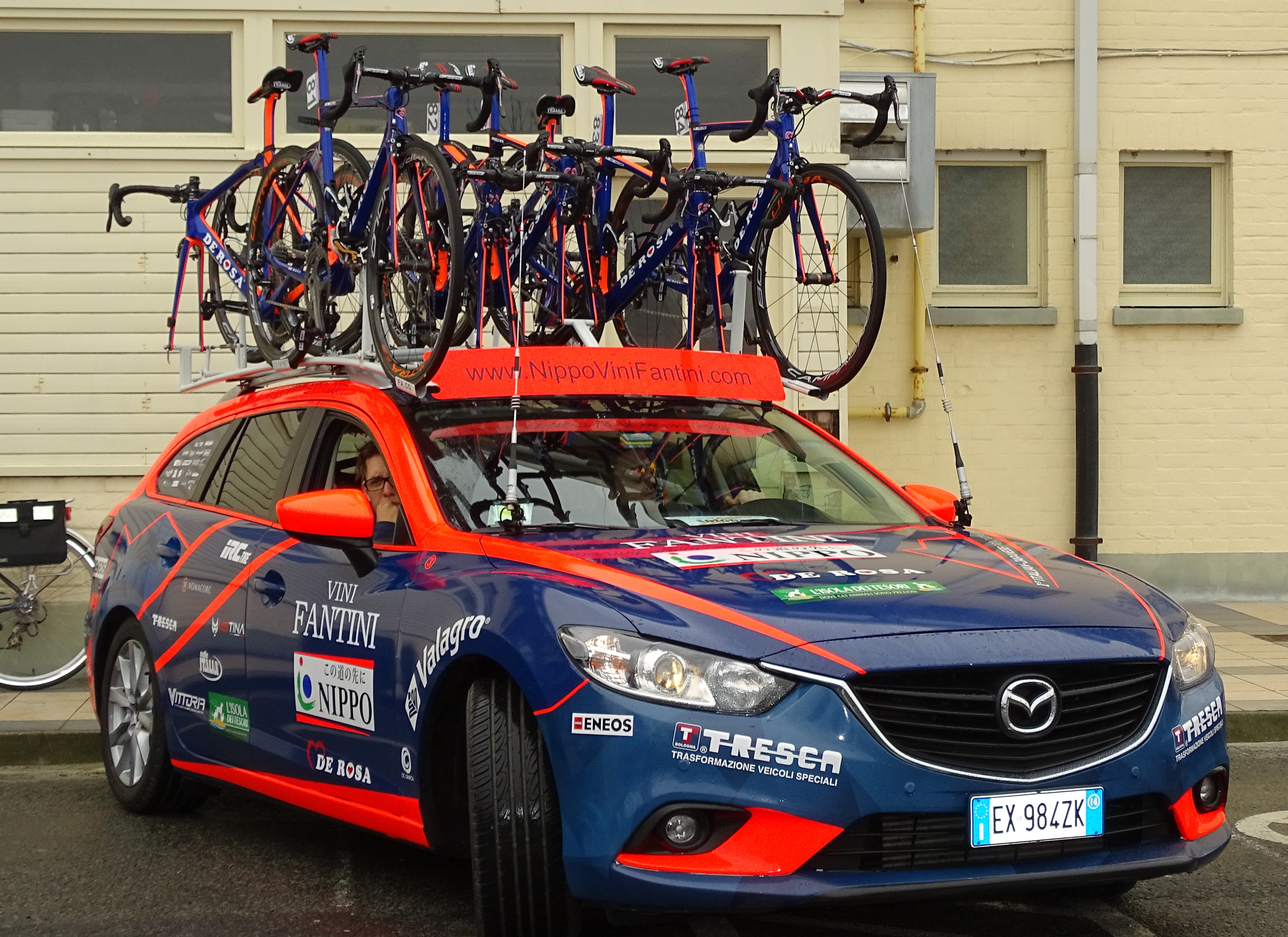 Reportage réalisé le vendredi 18 mars à l'occasion du départ de la Handzame Classic 2016 à Bredene, Belgique.